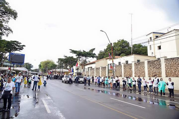 Penal de mujeres del "Buen Pastor", sitio donde el Papa Francisco realizó una breve parada, el viernes 10 de julio de 2015.